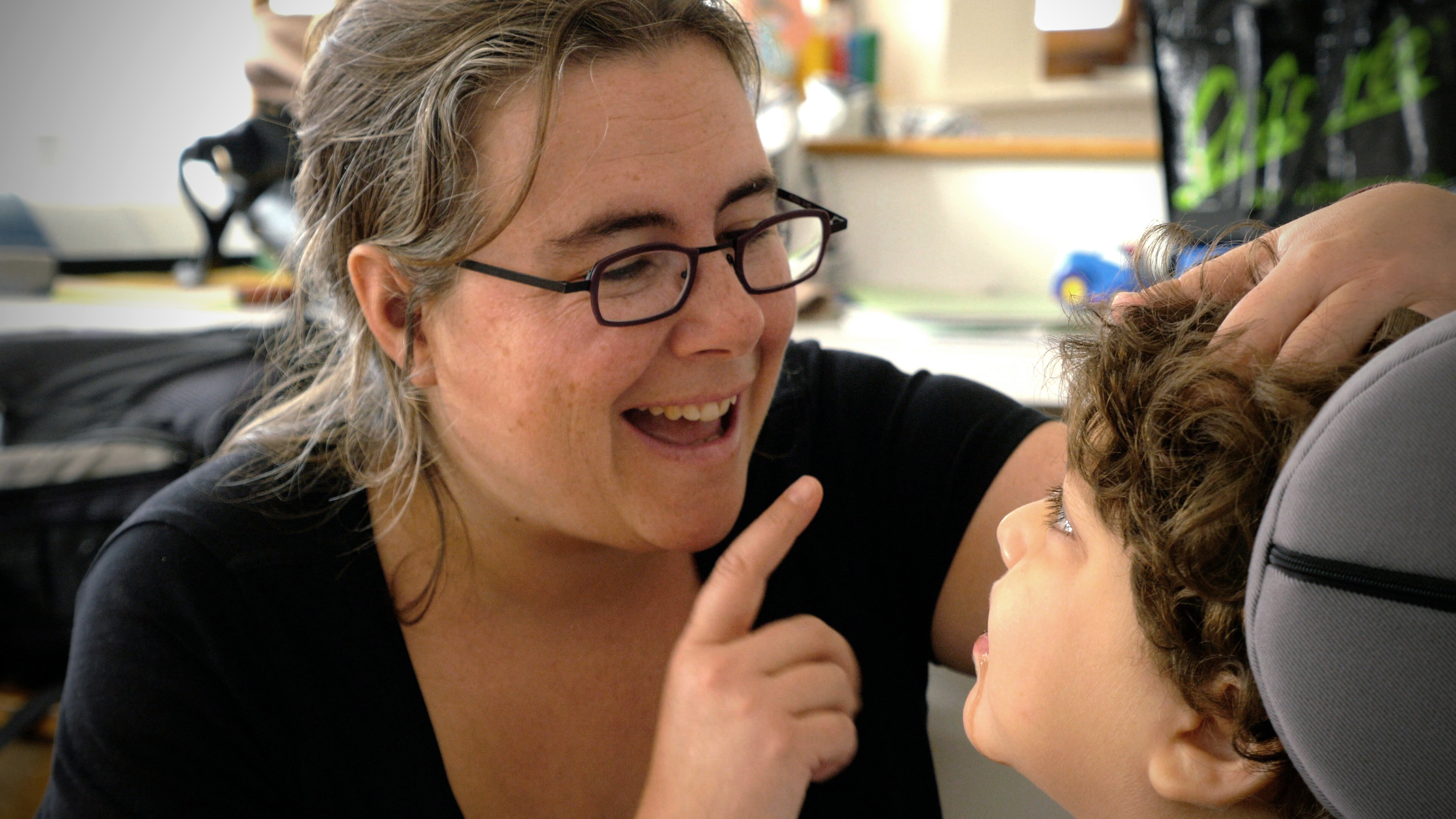 Adeline l'enseignante avec Kenza.Image du film de Fernand Melgar " À l'école des Philosophes"